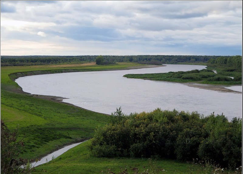 Излучина реки Тура в районе села Каменка (Тюменский район).